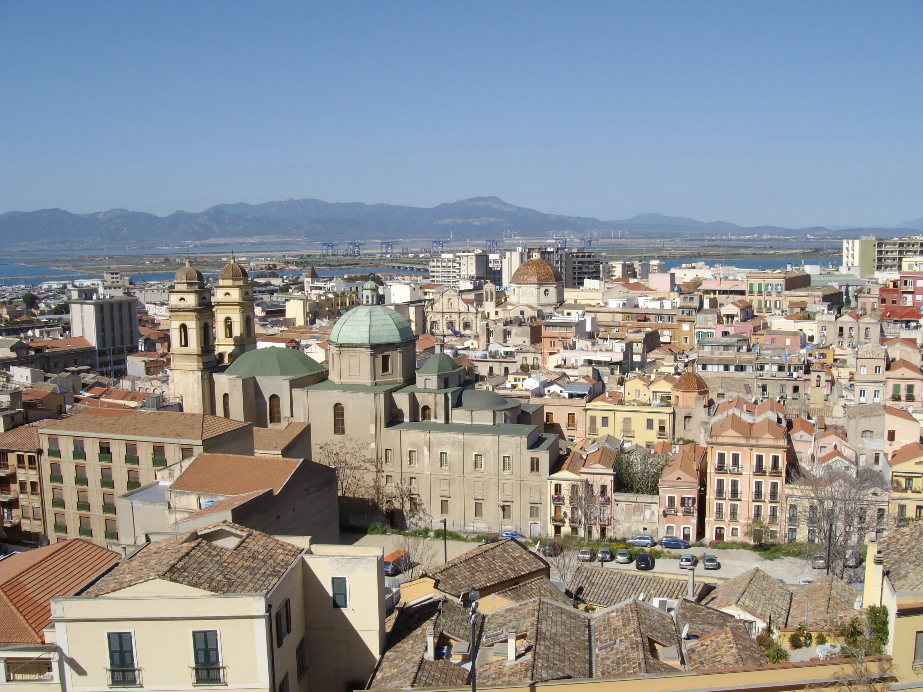 Stampace dal bastione di Santa Croce